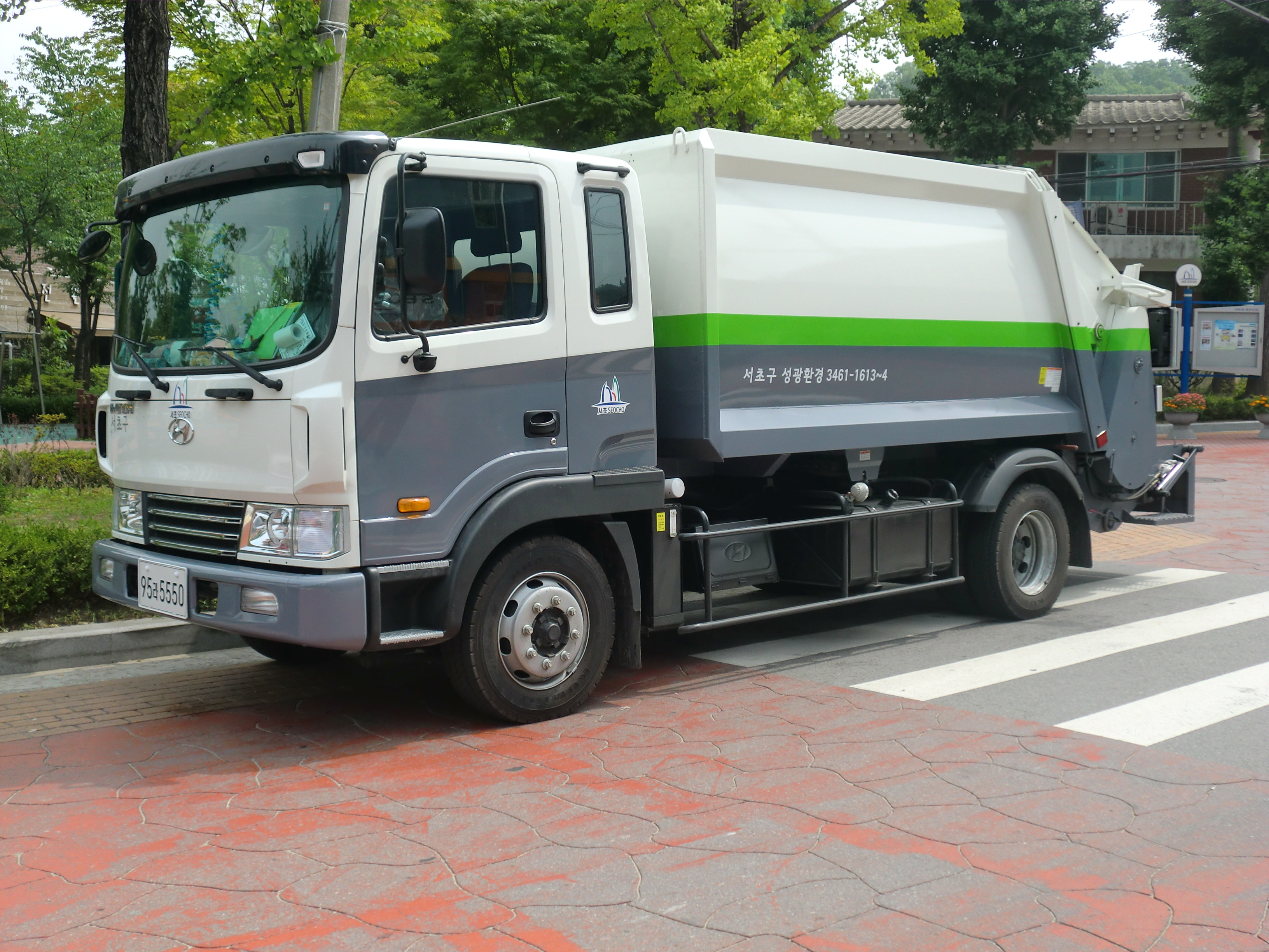 서울특별시 서초구의 스례기 수집차